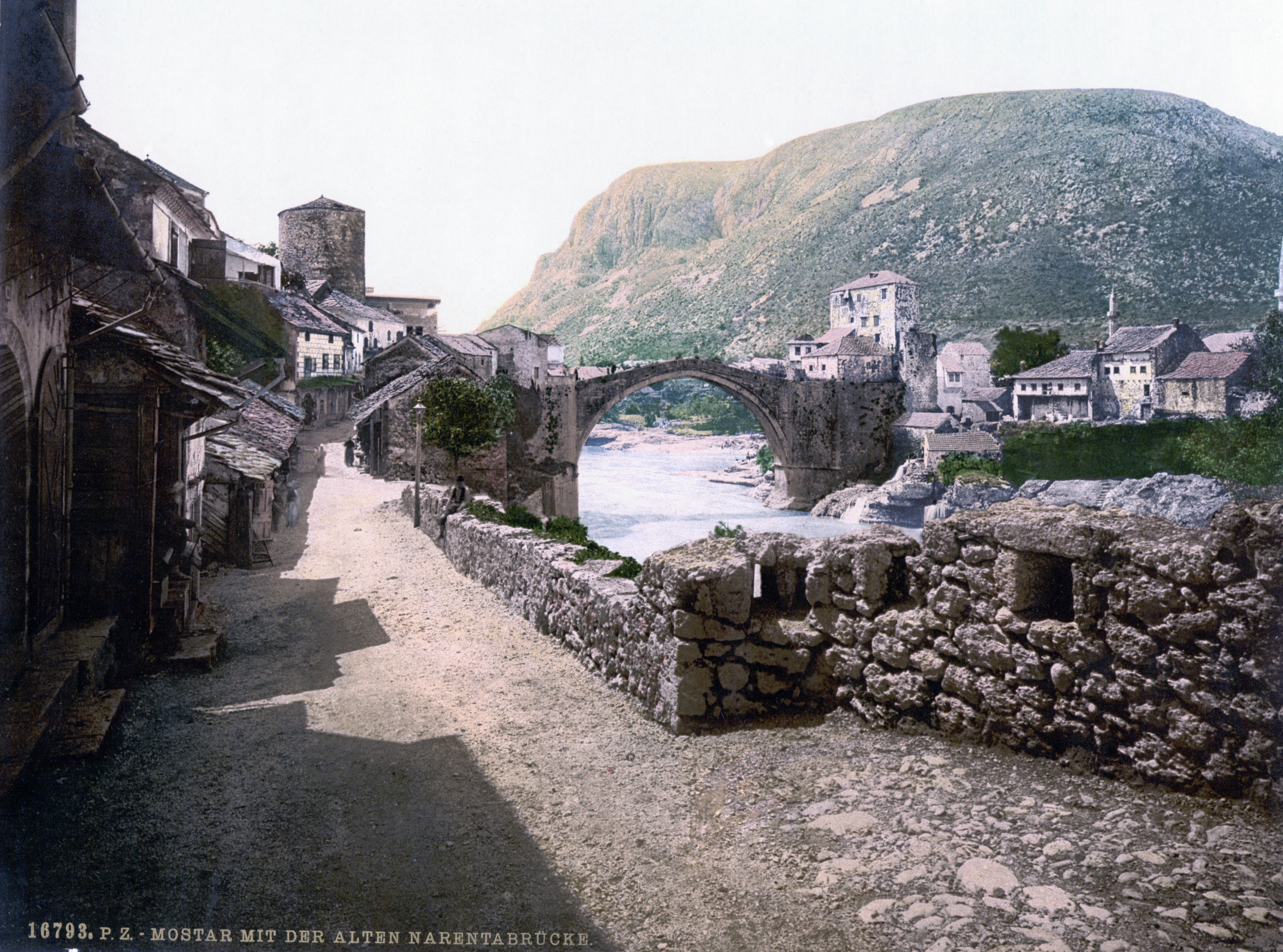 Alte Narentabrücke in Mostar